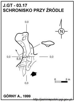 Schronisko przy Źródle w Dolinie Mnikowskiej - plan